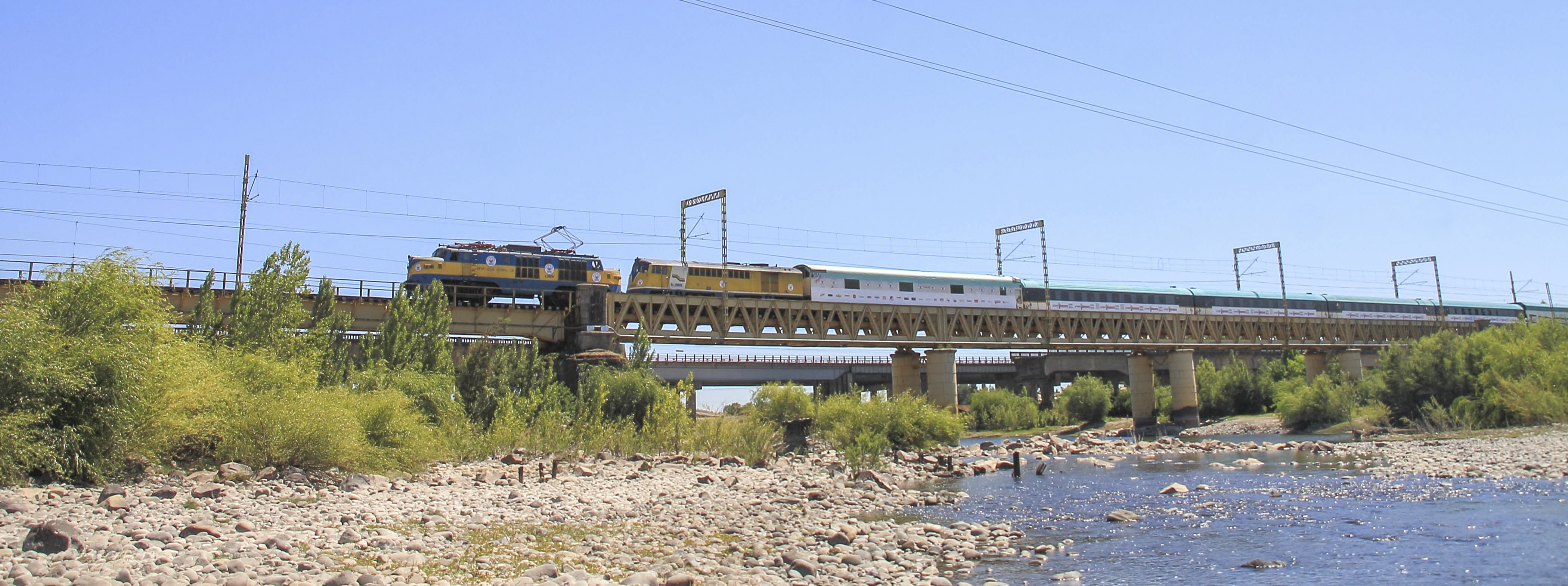 Rail transport infrastructure in Chile. Una de las tantas postales que nos dejo el Tren de la Teleton en este año 2014, la Teleton aun no termina pero la meta se cumplió pese a las diversas dificultades que se vieron con el pasar de las horas, Gracias también a todos los que hicieron posible la vuelta de este tren. Tren de la Teleton cruzando el puente sobre el Rio Longavi, VII región del Maule, Chile.